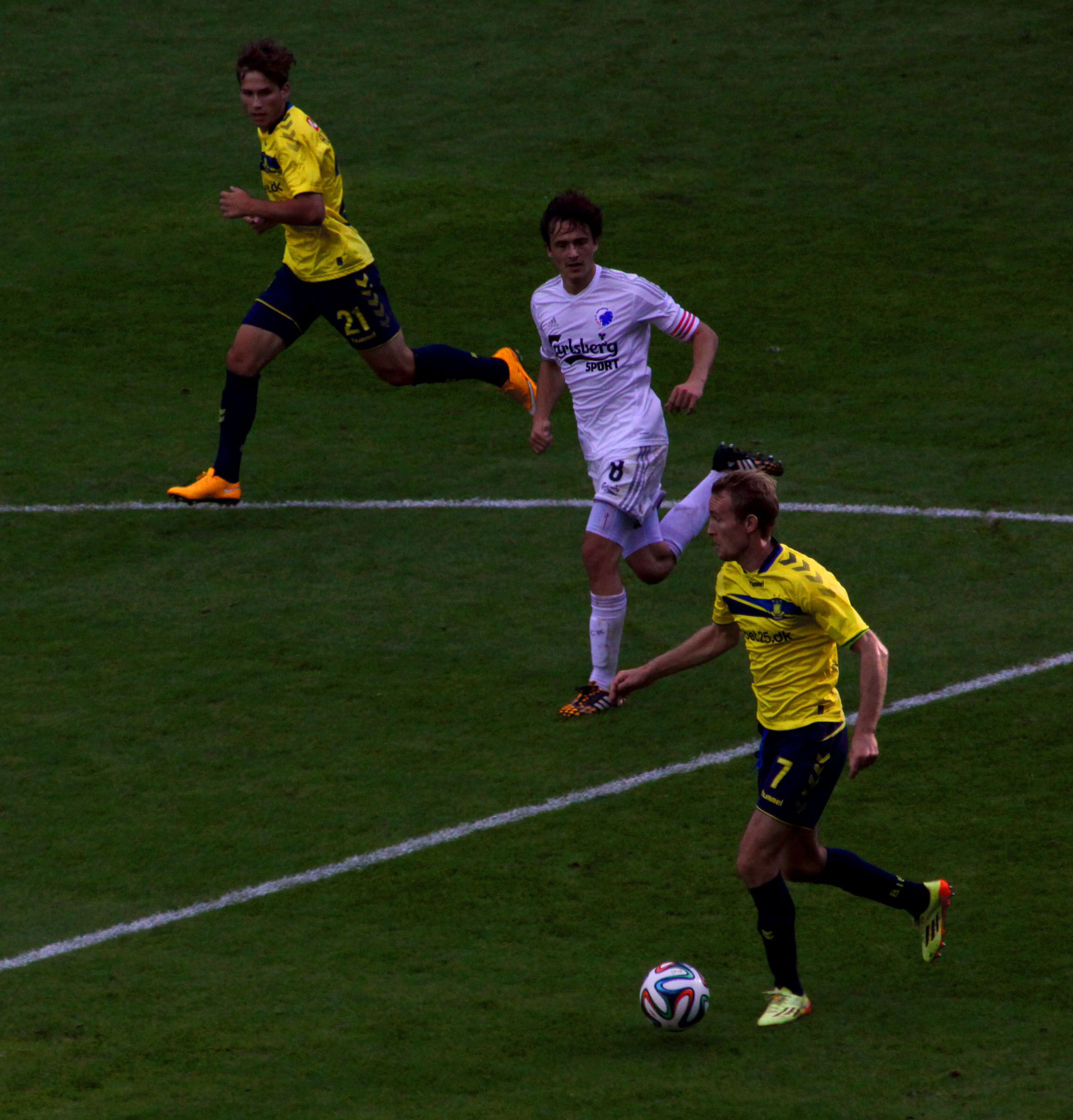 København / Copenhagen. FCK - Brøndby i Parken.